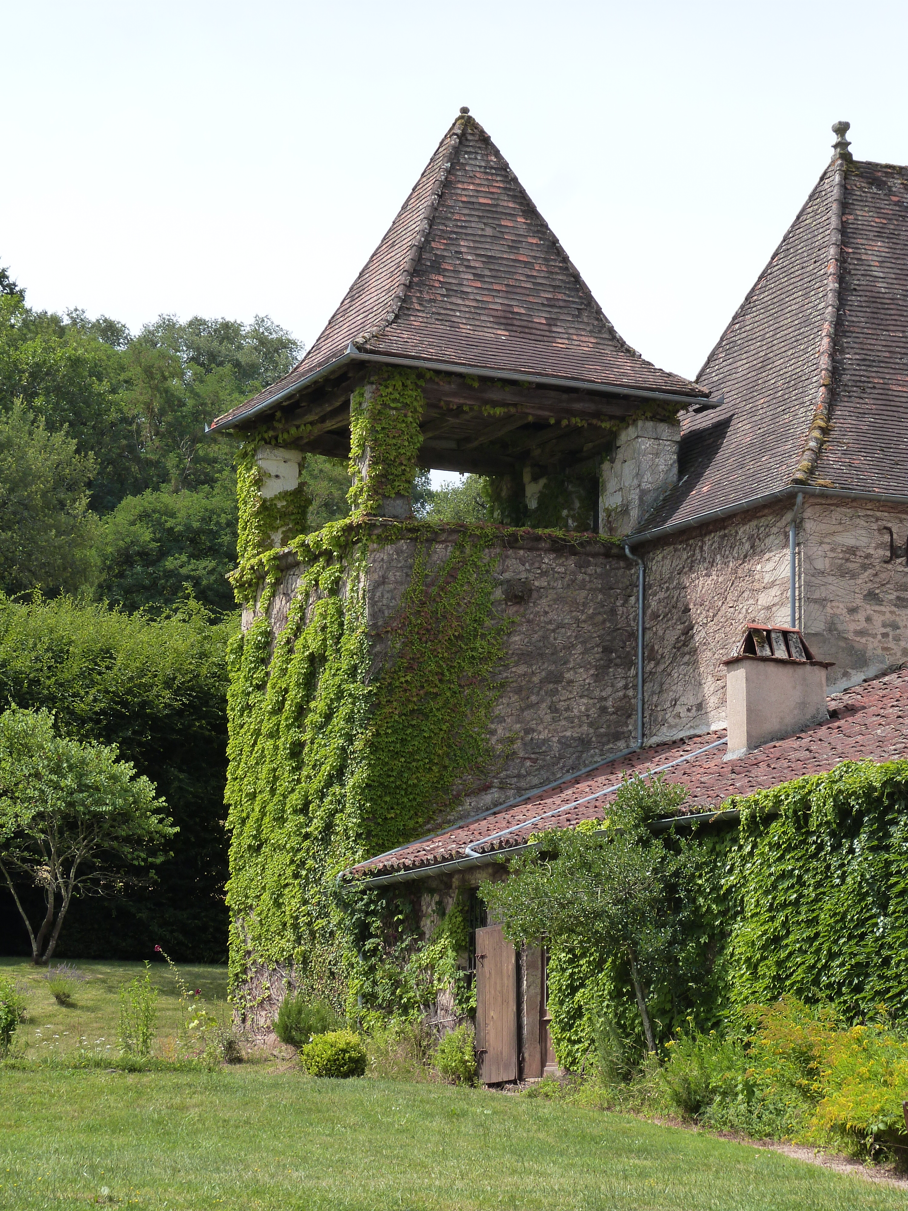 Tour carrée située à l'est au château de la Rauze (Le Bourg, Lot)